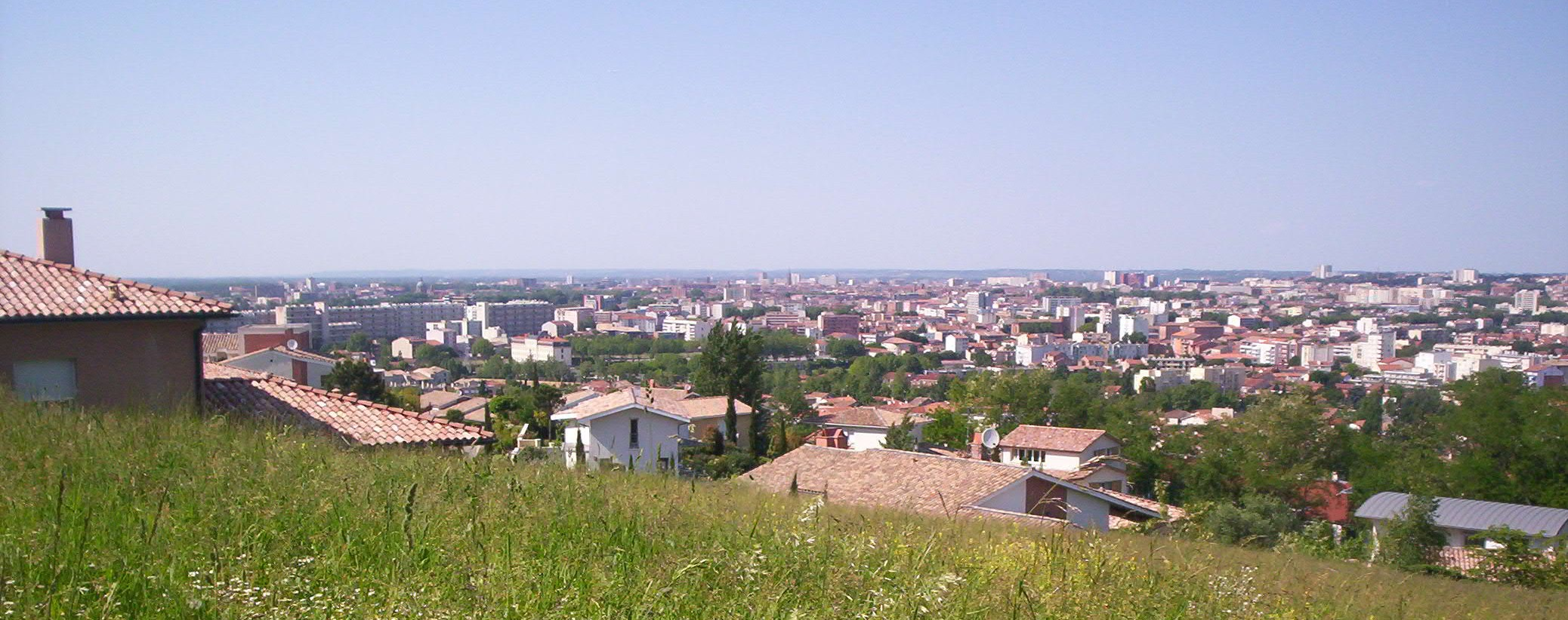 Toulouse depuis les coteaux de Pech-David.